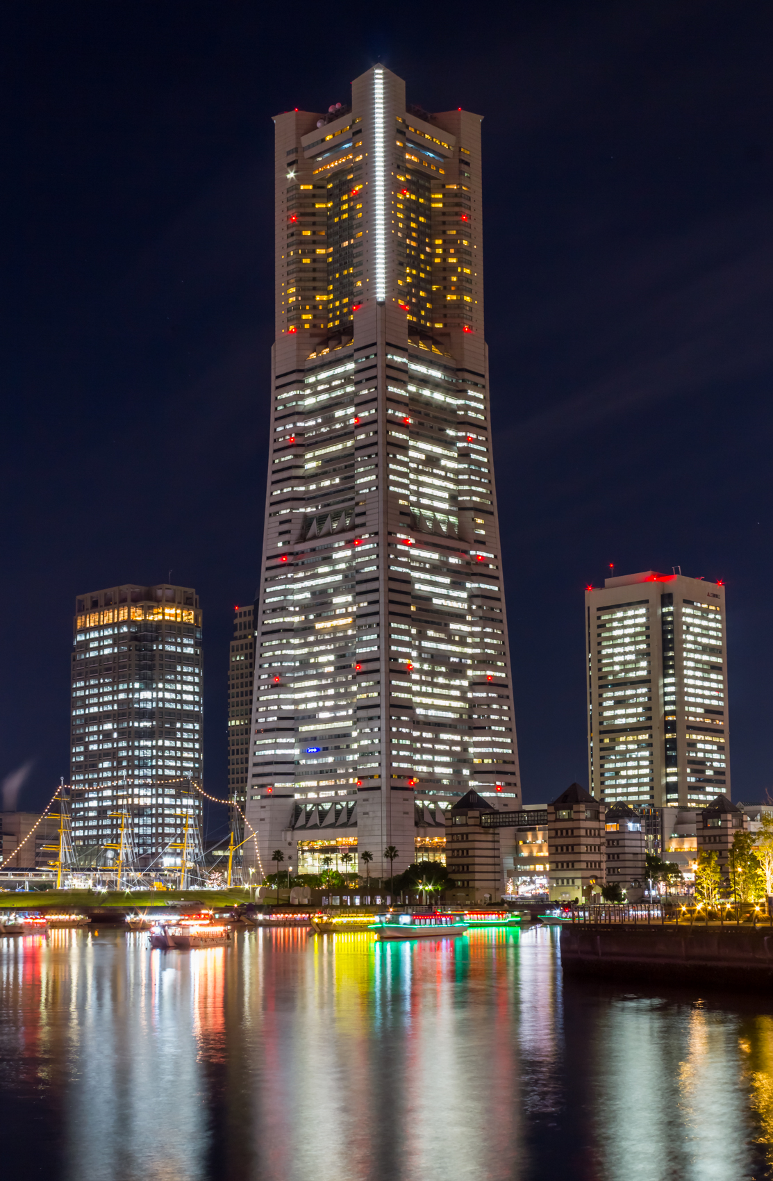 Yokohama Landmark Tower（神奈川県横浜市）